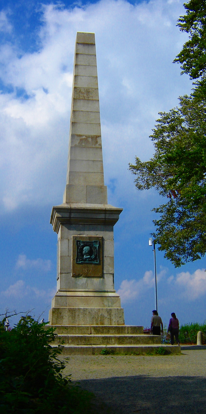 Die Canosasäule auf der Harzburg